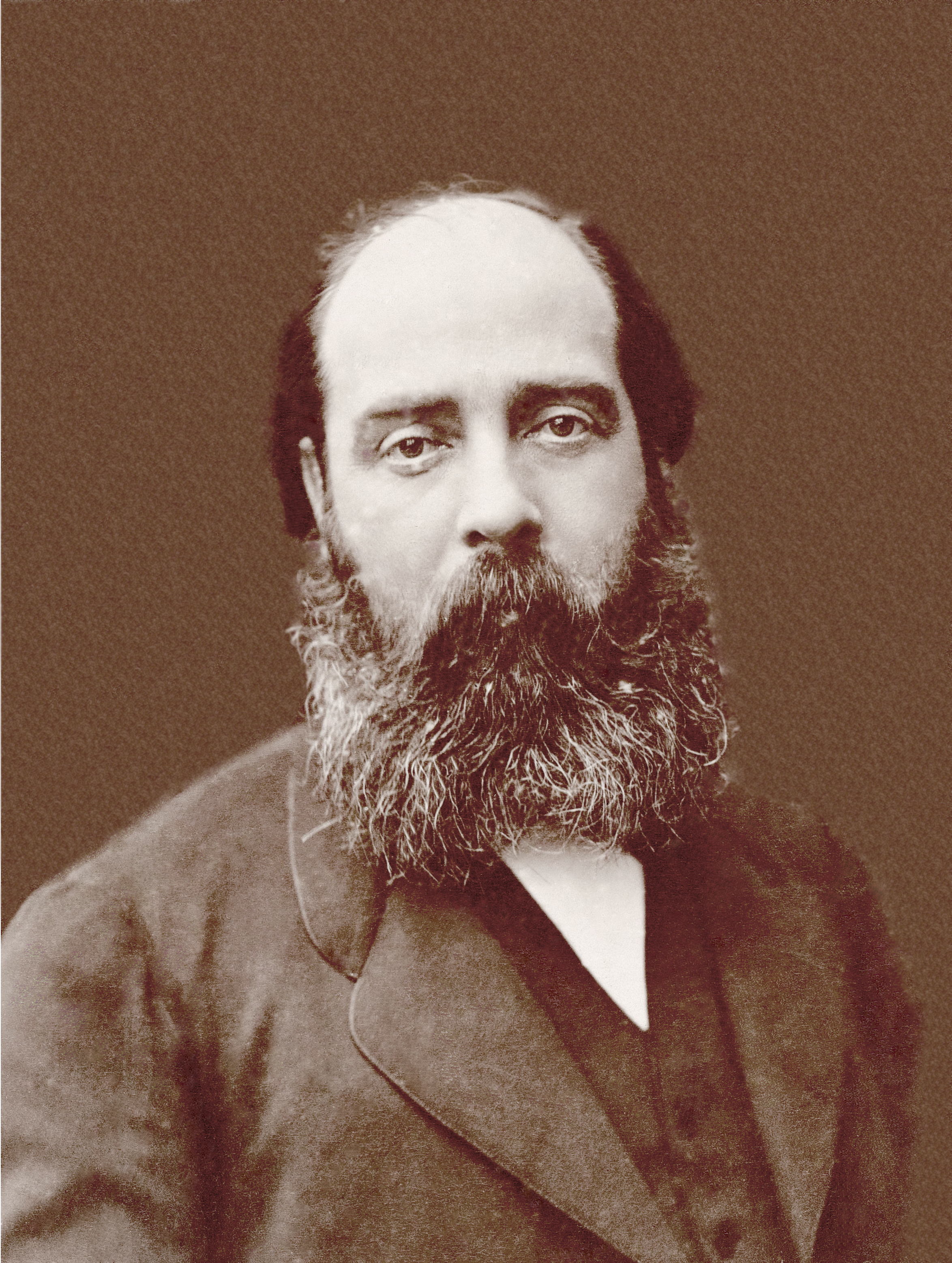 Hector Malot (1830 - 1907), écrivain français